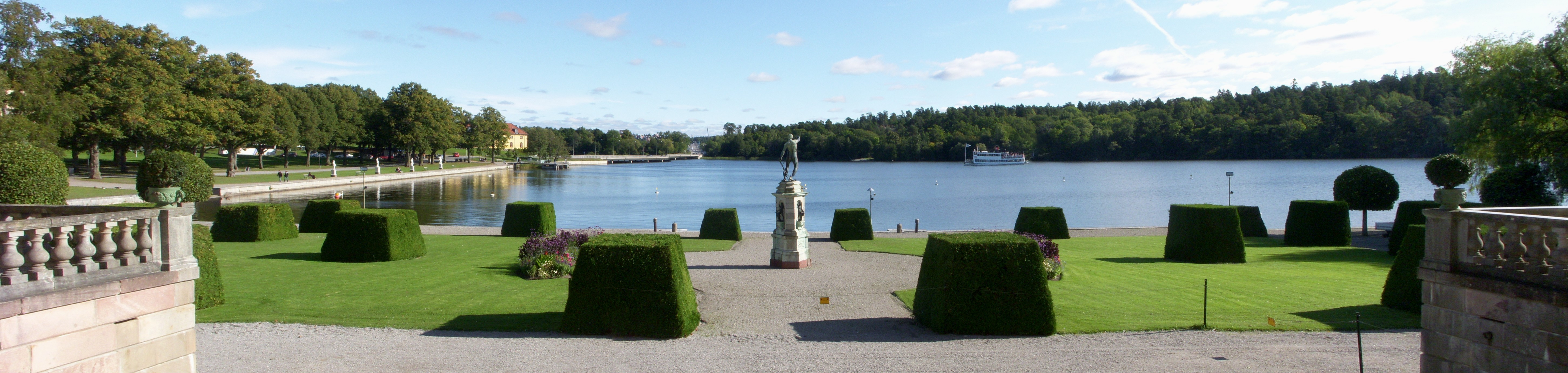 Drottningholms slott, sjöparterren, panorama mot öst